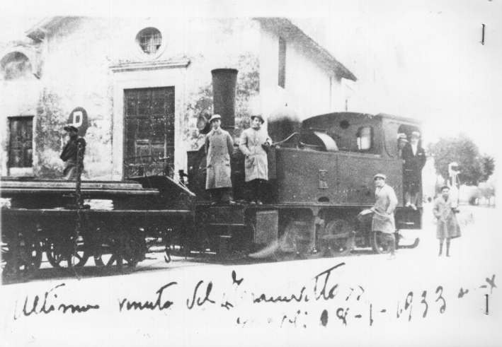 Ultime corse del tram Roma-Tivoli